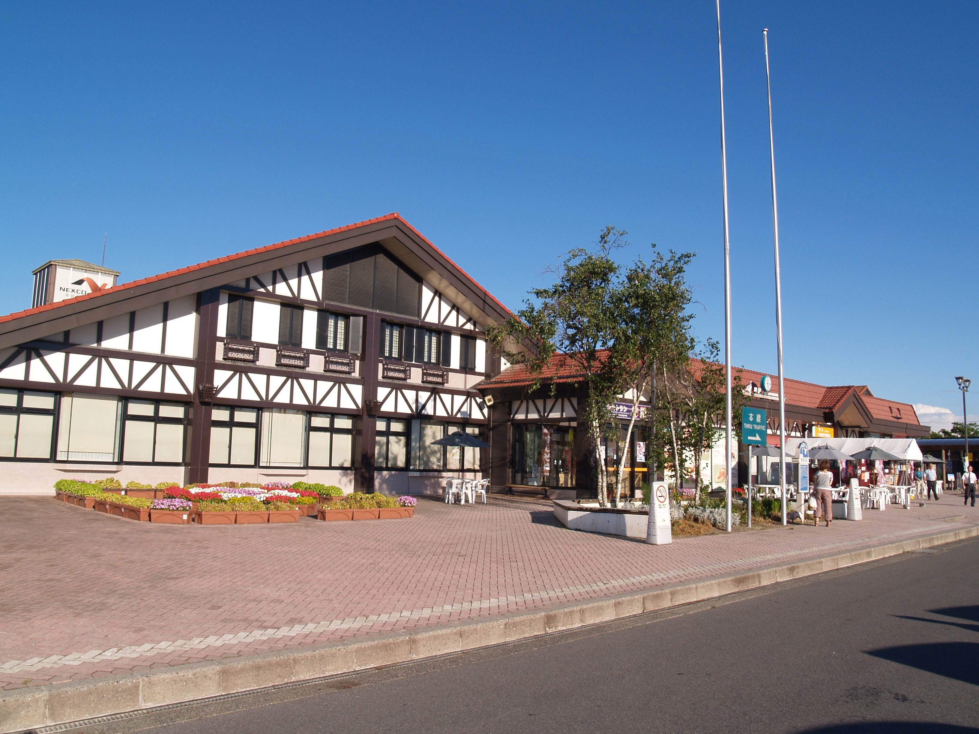 梓川サービスエリア上り線